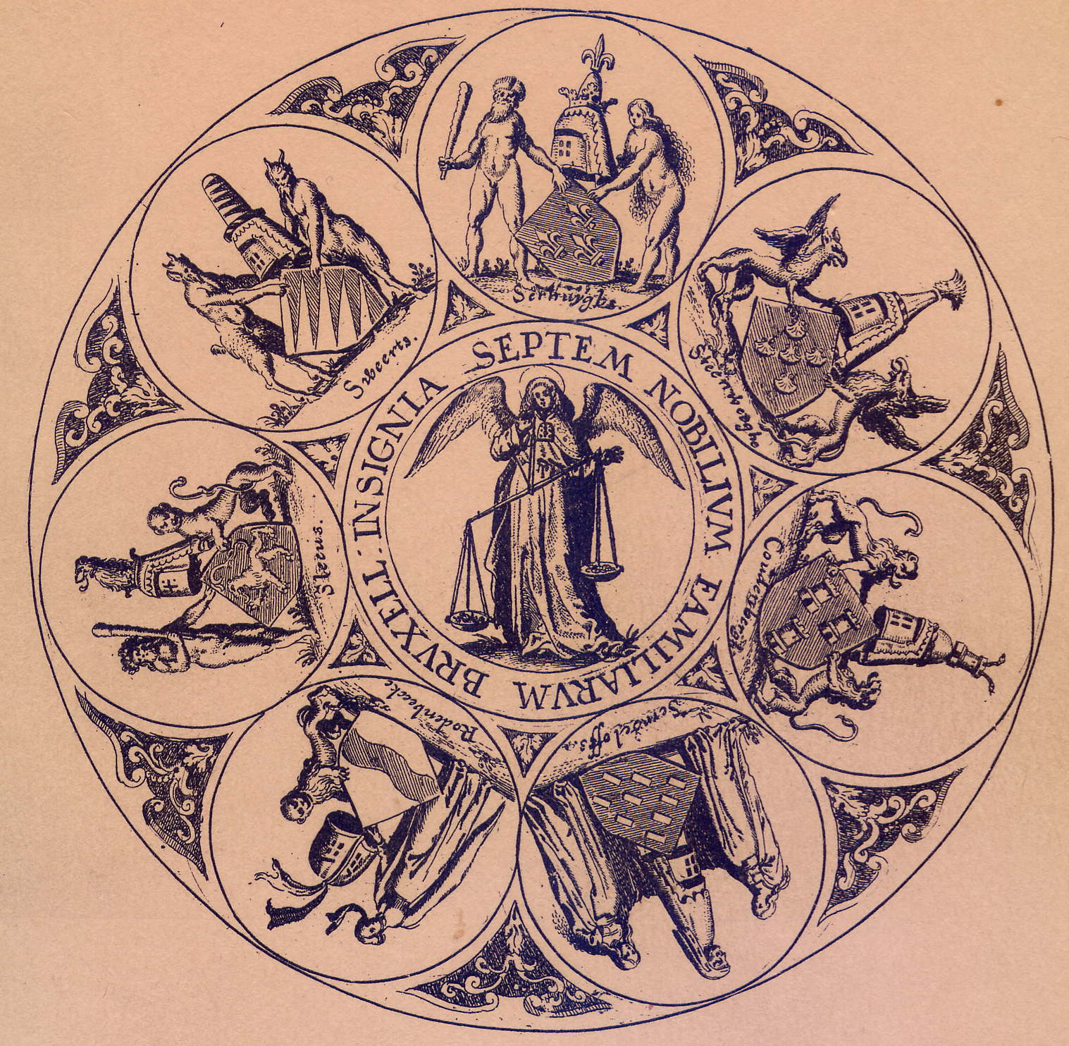 Rosace avec les blasons des Sept Lignages de Bruxelles